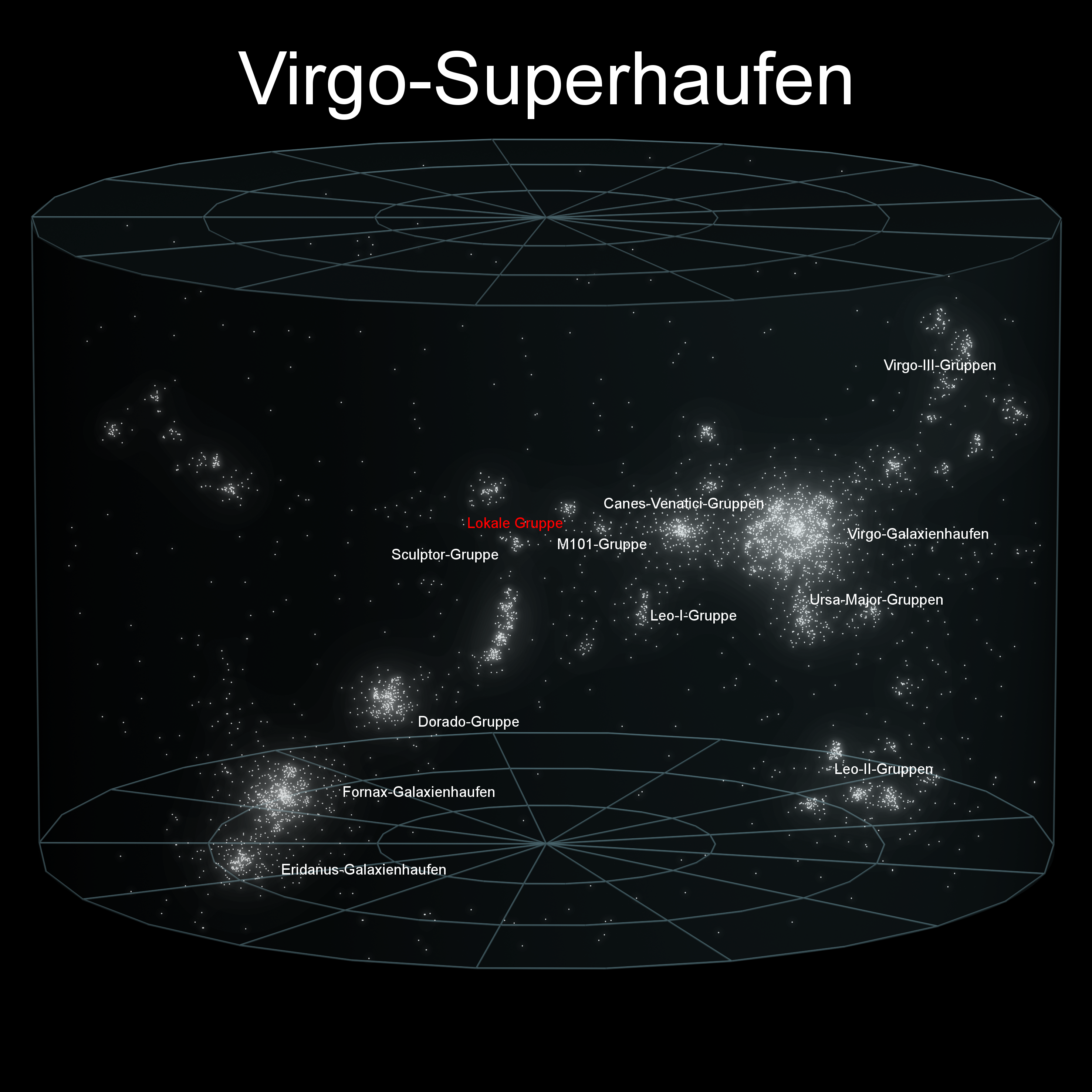 Ausblick ins Universum – Der Virgo-Superhaufen Ein Mosaik mit allen Bildern findet man hier der Erde im Universum 4x2.png